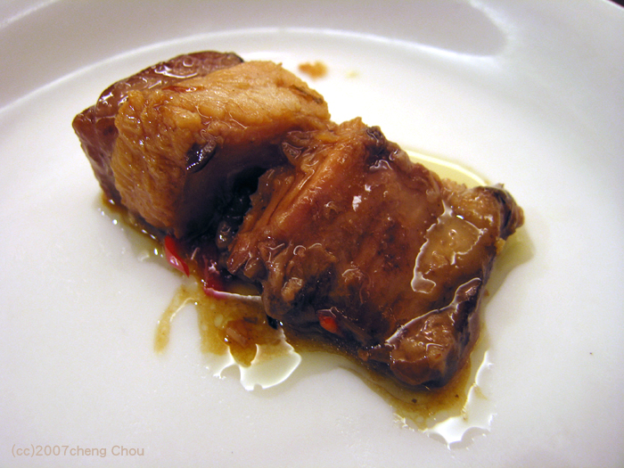 東坡肉細部解理示意圖